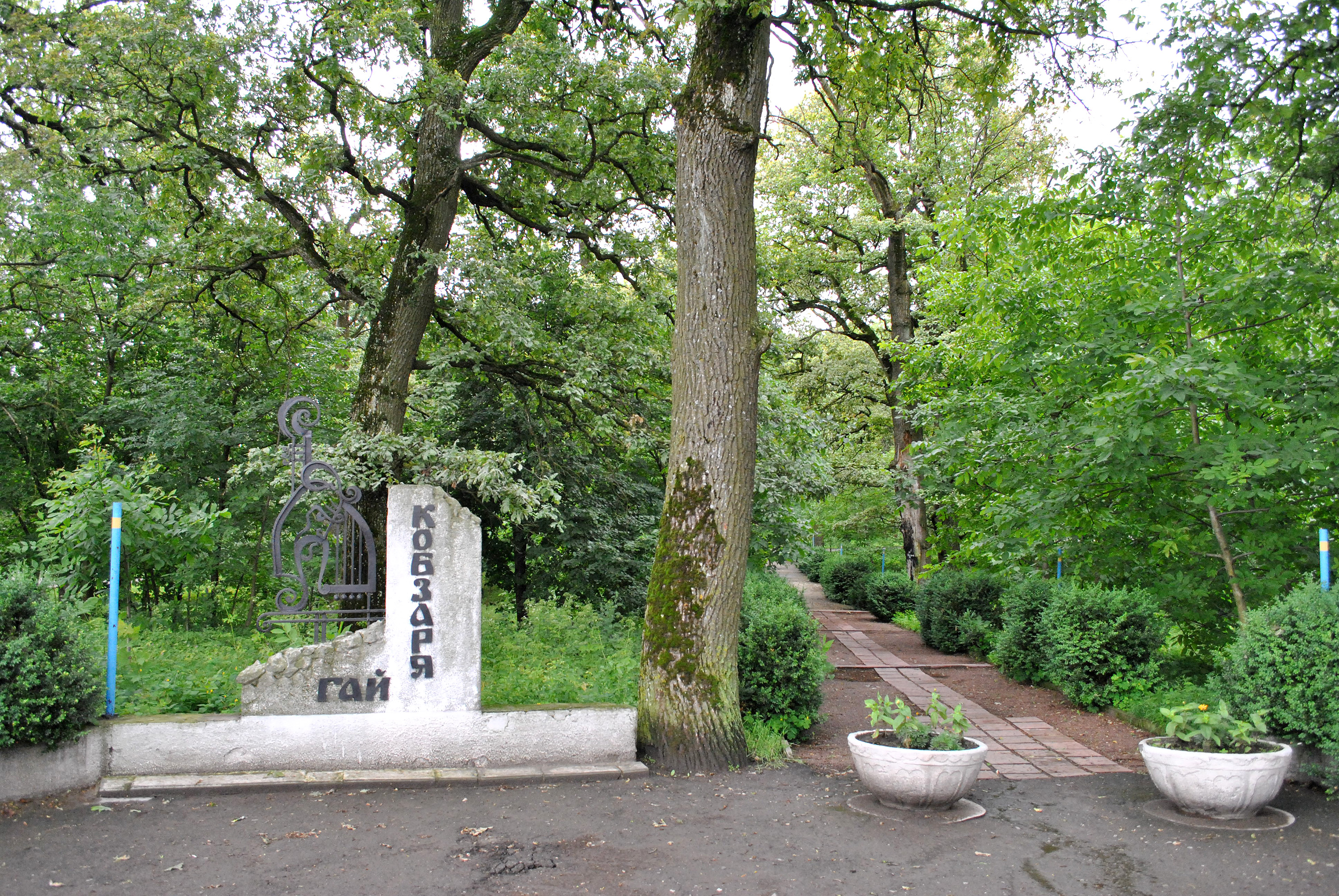 «Гай Кобзаря» в с. Великі Гаї Тернопільського району Тернопільської області.